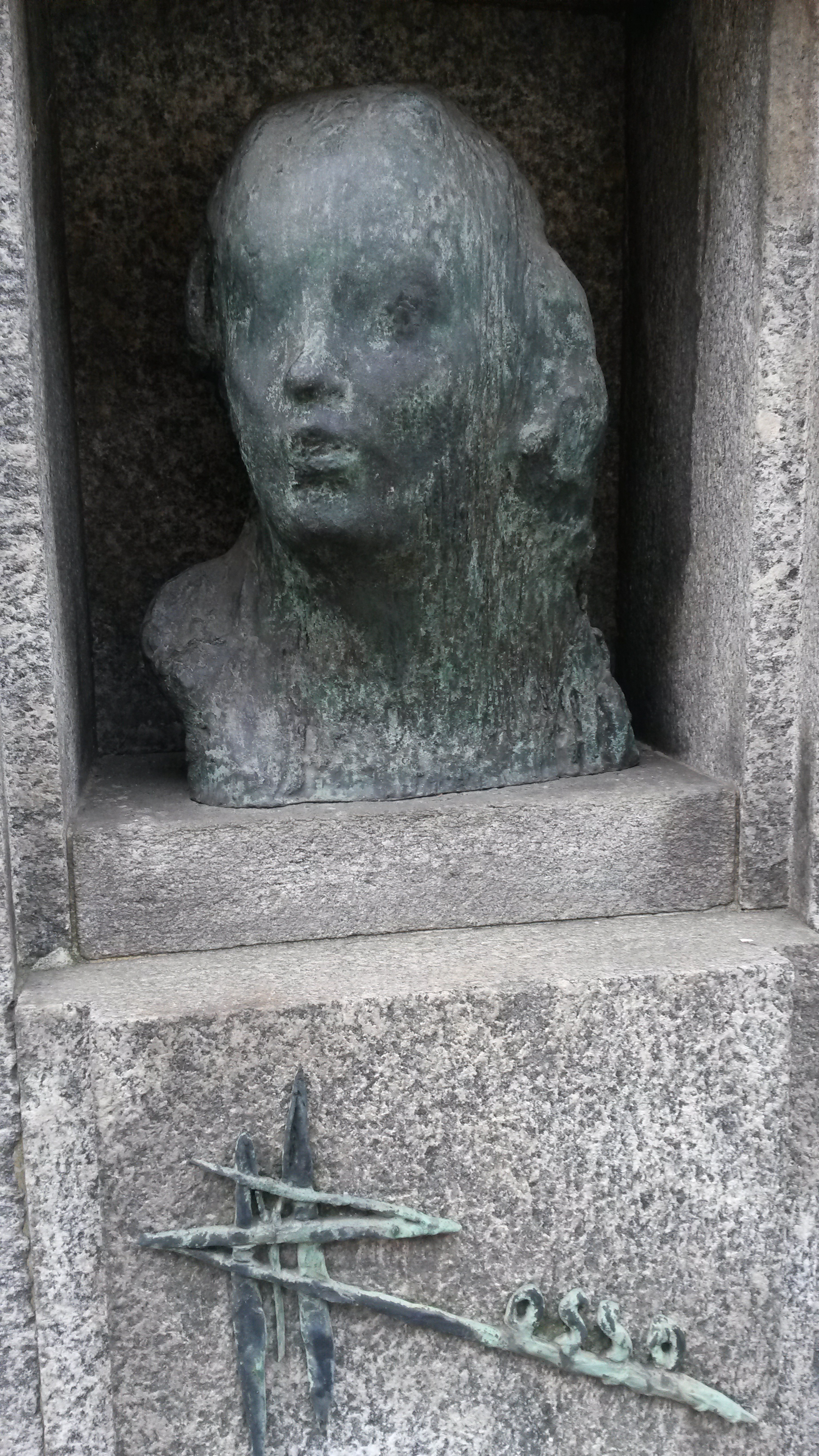 Tomba di Medardo Rosso, Cimitero monumentale di Milano (architetto Michele Vedani 1929, scultura "Ecce puer" di Medardo Rosso, copia in bronzo 1906)